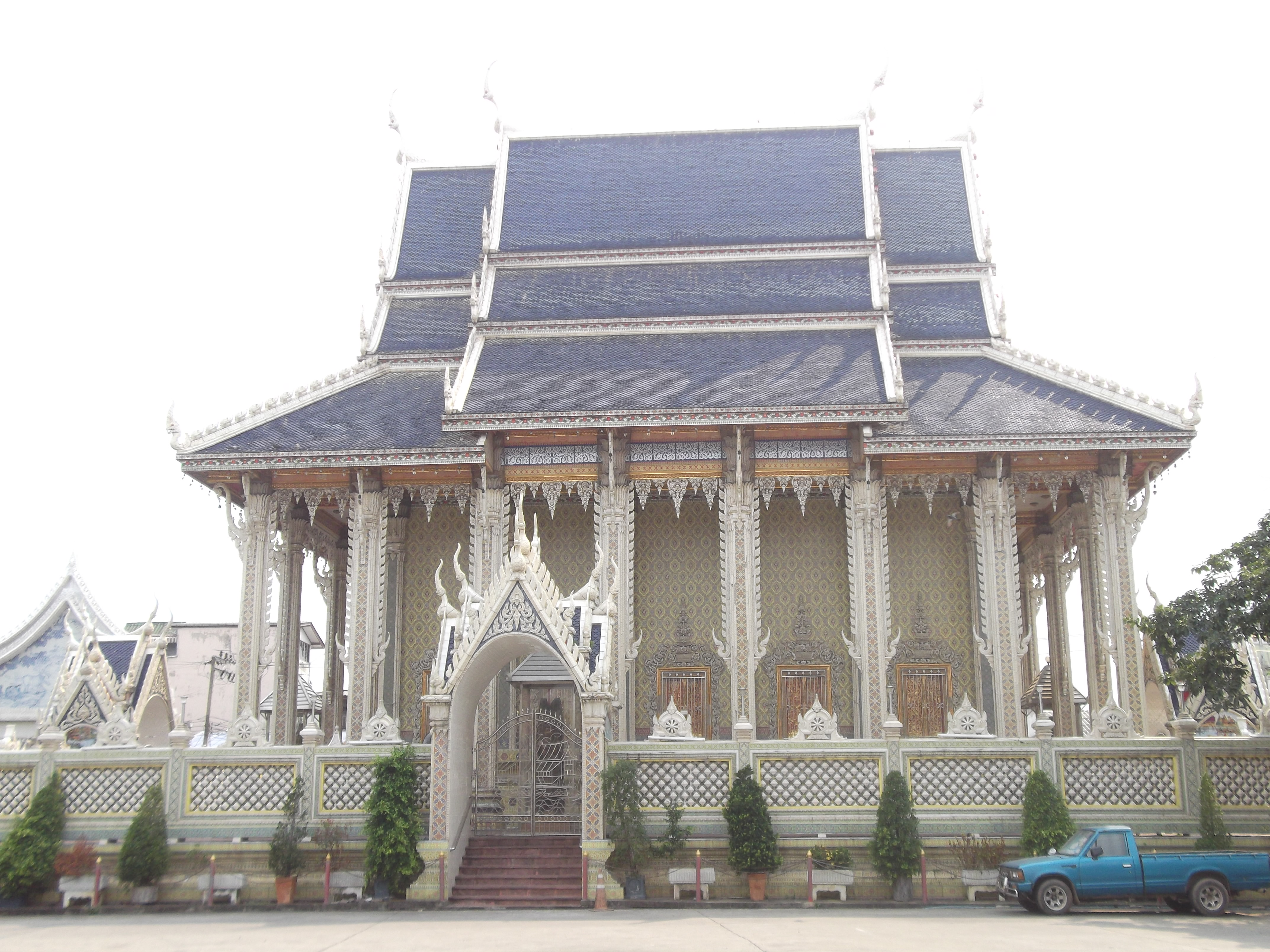 วัดไทร